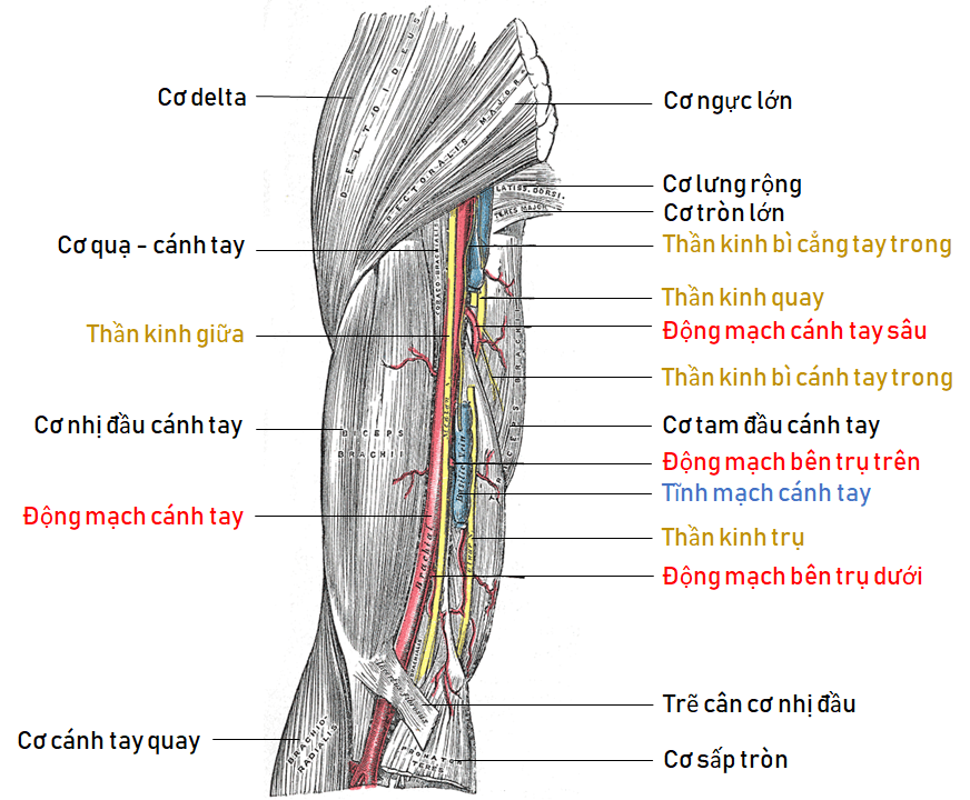 Động mạch cánh tay (Brachial artery)